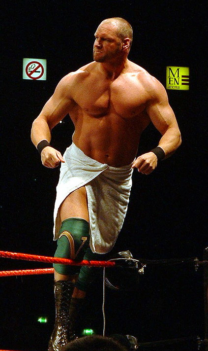 Val Venis